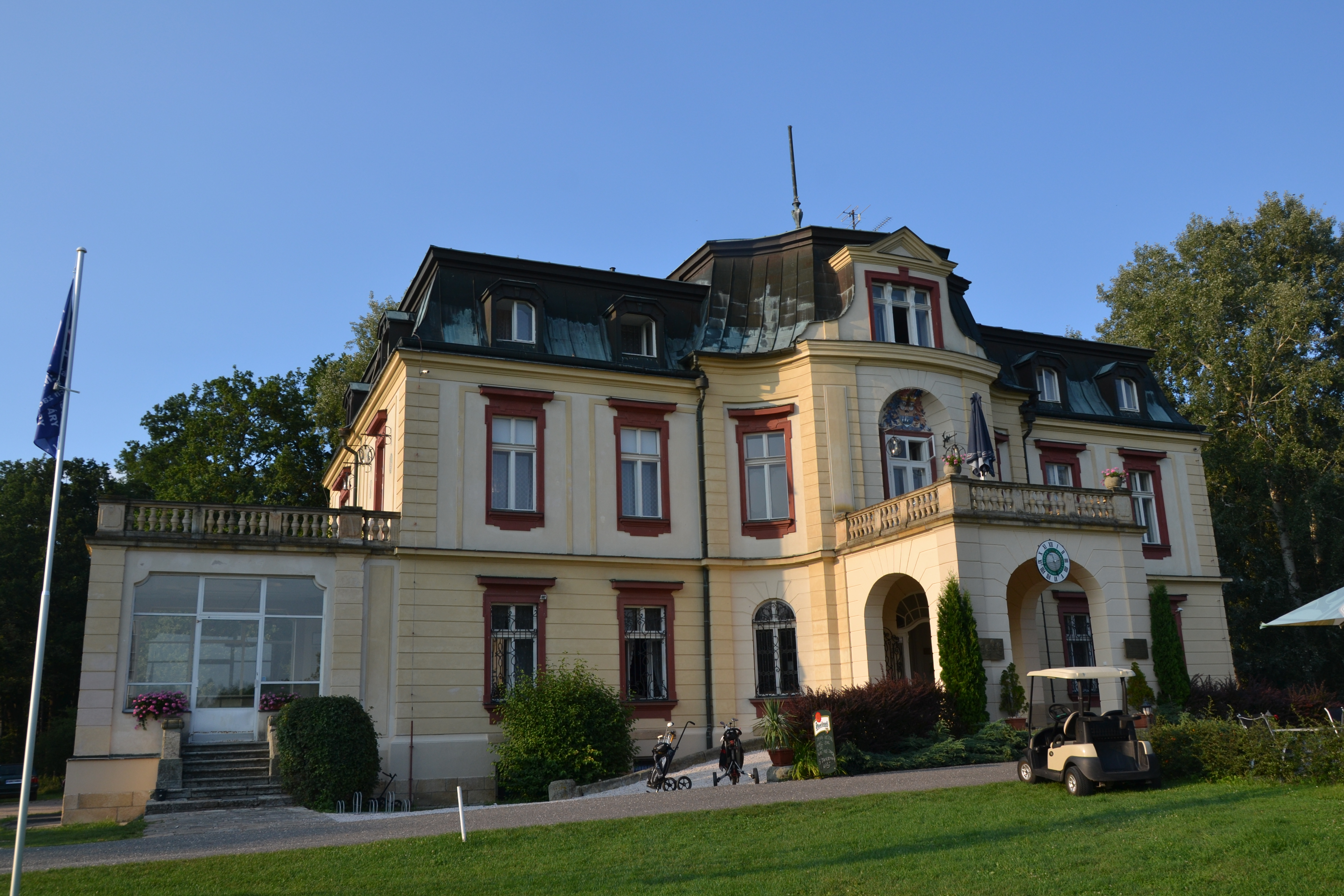 Zámek Blažkov Myštěves, Myštěves 105